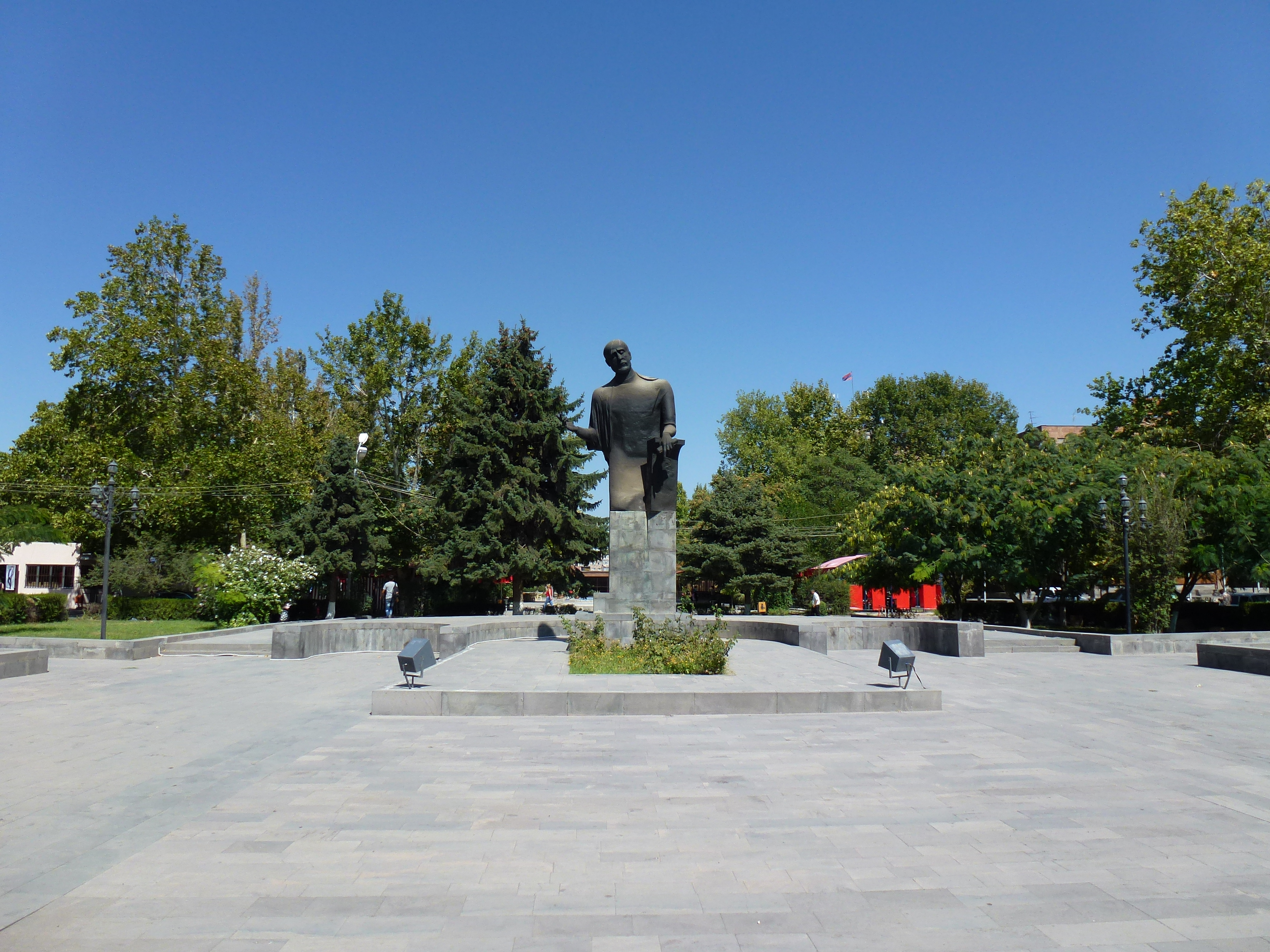 Կոմիտասի արձանը Էջմիածնում 2/22